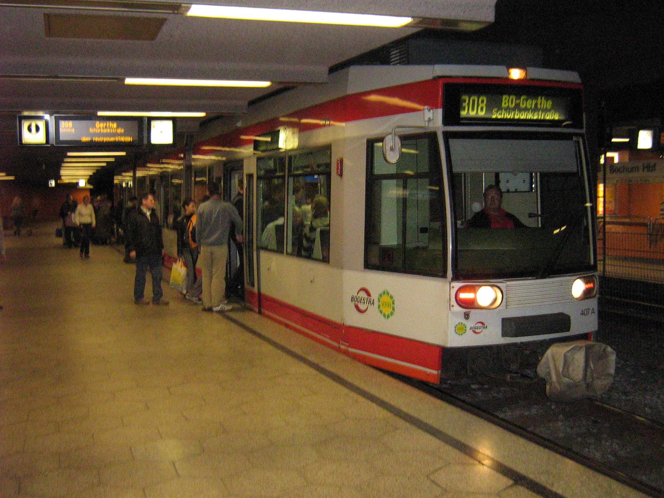 Ein NF6D der Bogestra bedient die Linie 308 in Richtung Bochum-Gerthe und befindet sich in der unterirdischen Station Bochum Hbf.